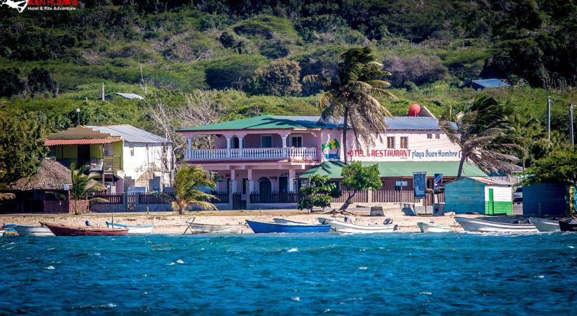 Esta playa esta ubicada en el municipio de Villa Vásquez en el paraje Buen Hombre.